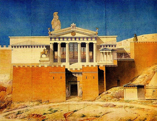 Fachada oeste restaurada de los Propileos de la Acrópolis, de Louis-François Boitte, 1864. Escuela de Bellas Artes, París. – Imagen de la cubierta del libro La Grecia antigua: Arqueología de un descubrimiento por Roland Étienne y Françoise Étienne, colección «Aguilar universal●Arqueología» (nº 32), 1992. Descripción en la página 171.